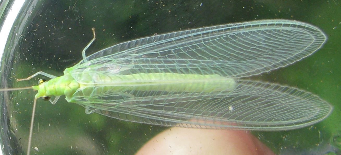 Kjempegulløye Nineta vittata.Template:Byline